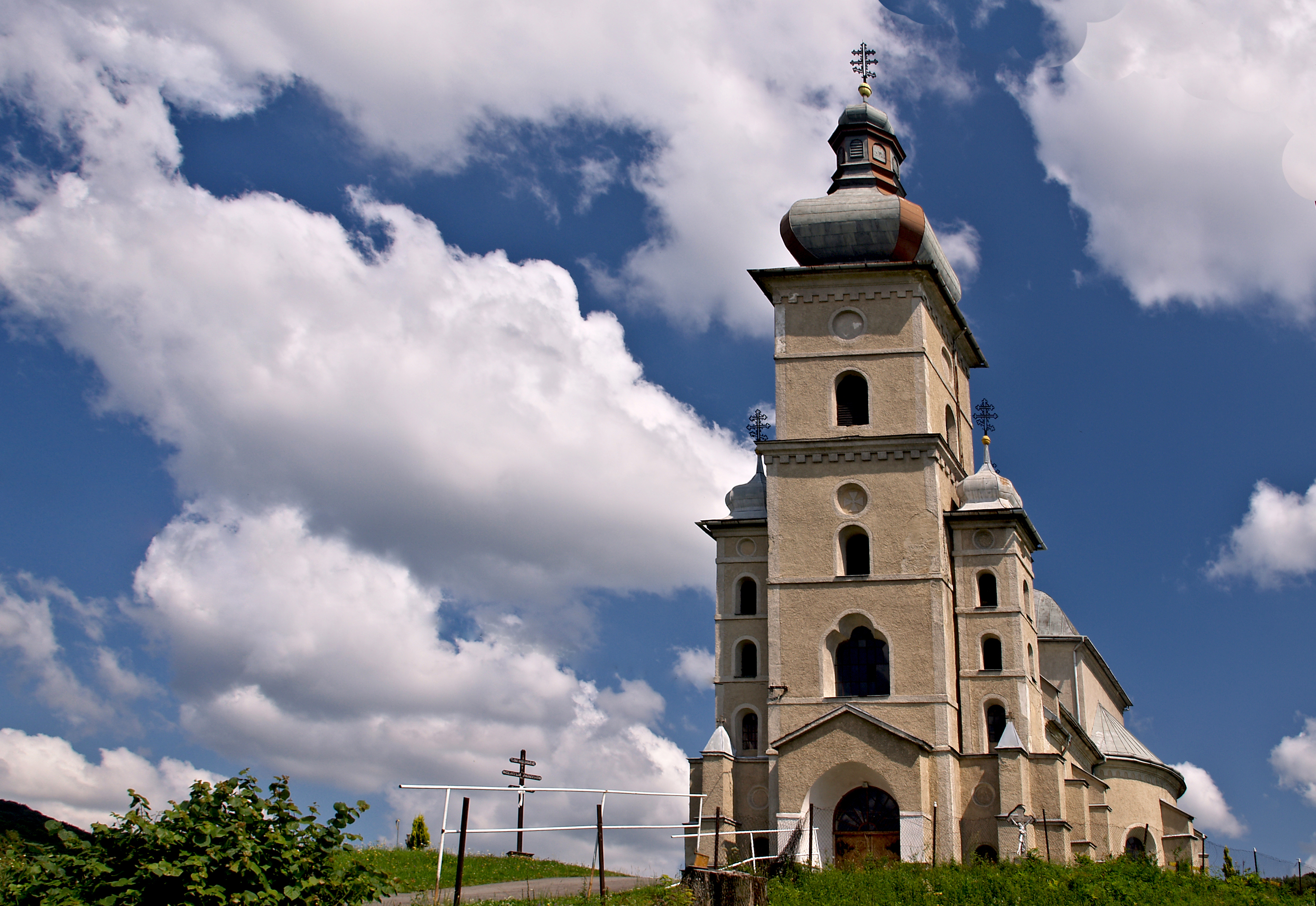 Čertižné (District de Medzilaborce - Prešovský kraj) - L'église gréco-catholique